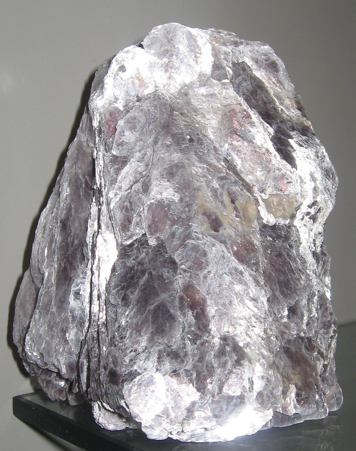 schuppenartiger Lepidolith aus Brasilien